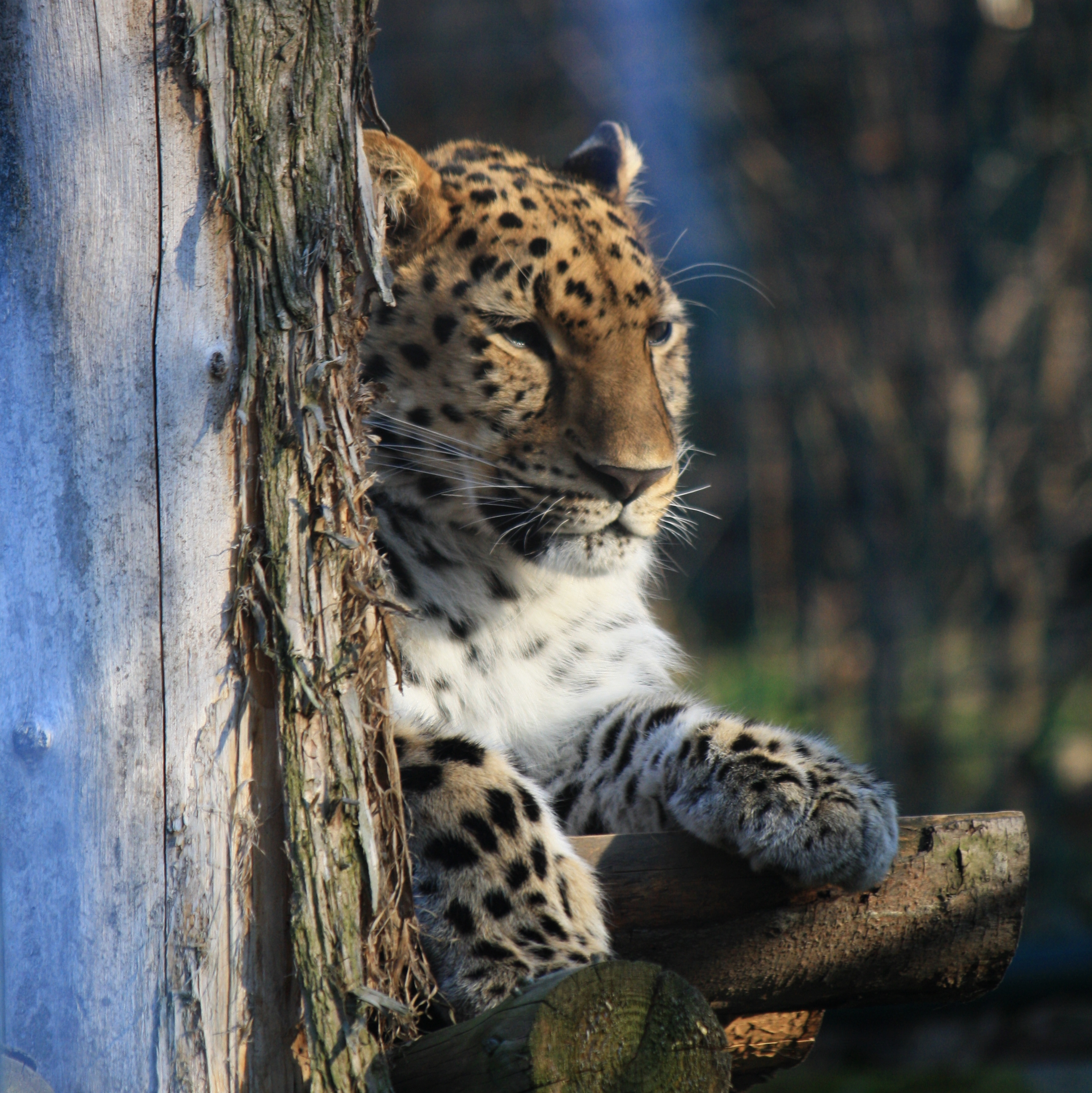 Levhart mandžuský v pražské Zoo